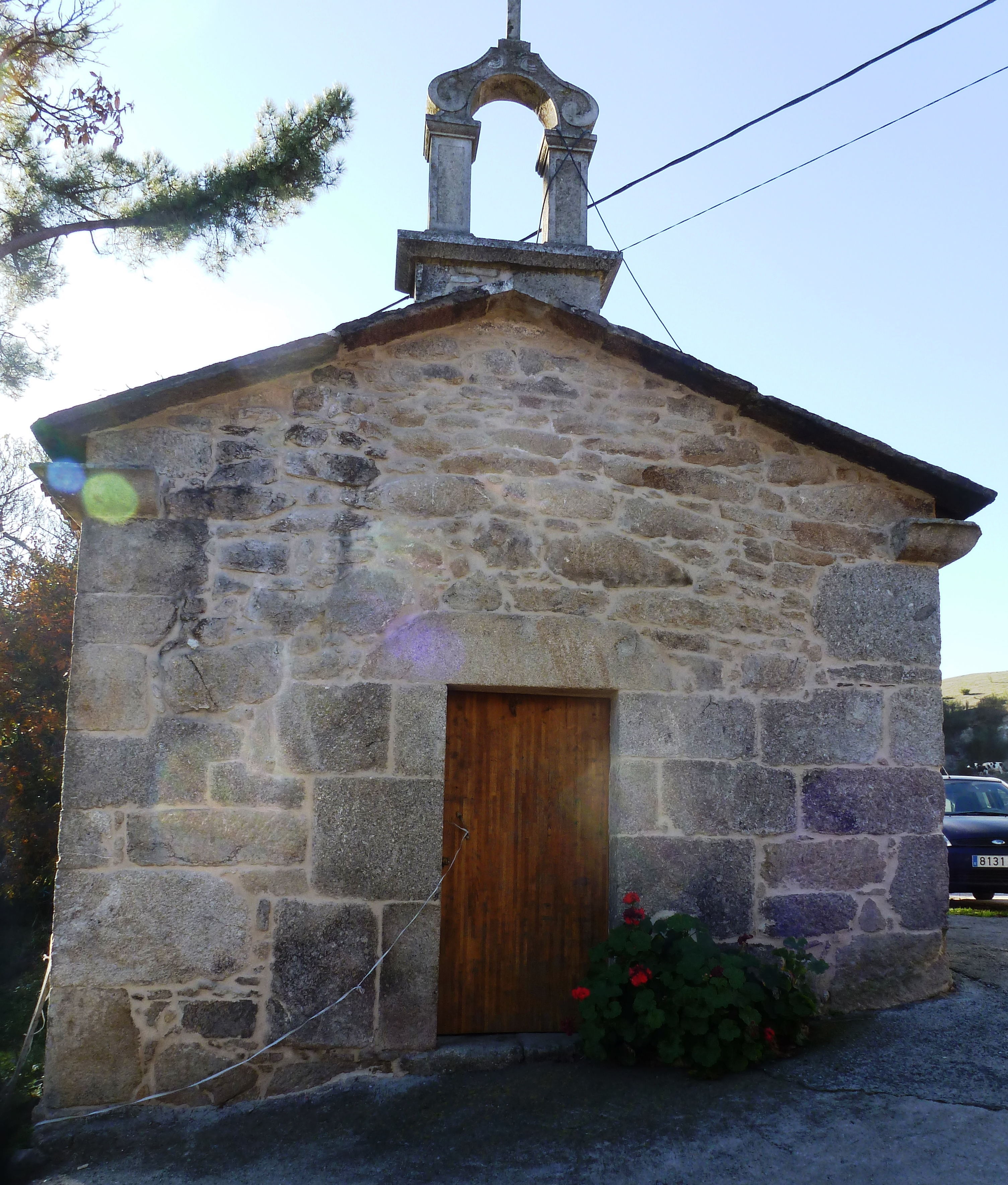 Aspai, Santa Uxía, Chantada